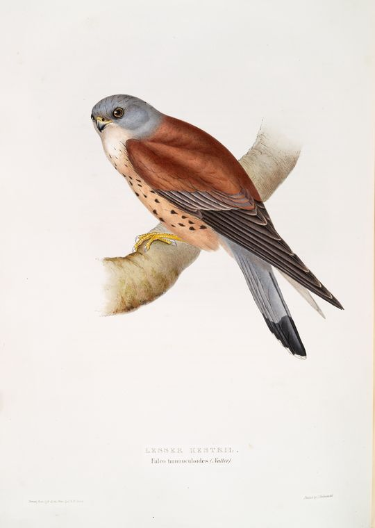 Lesser Kestrel, Falco naumanni